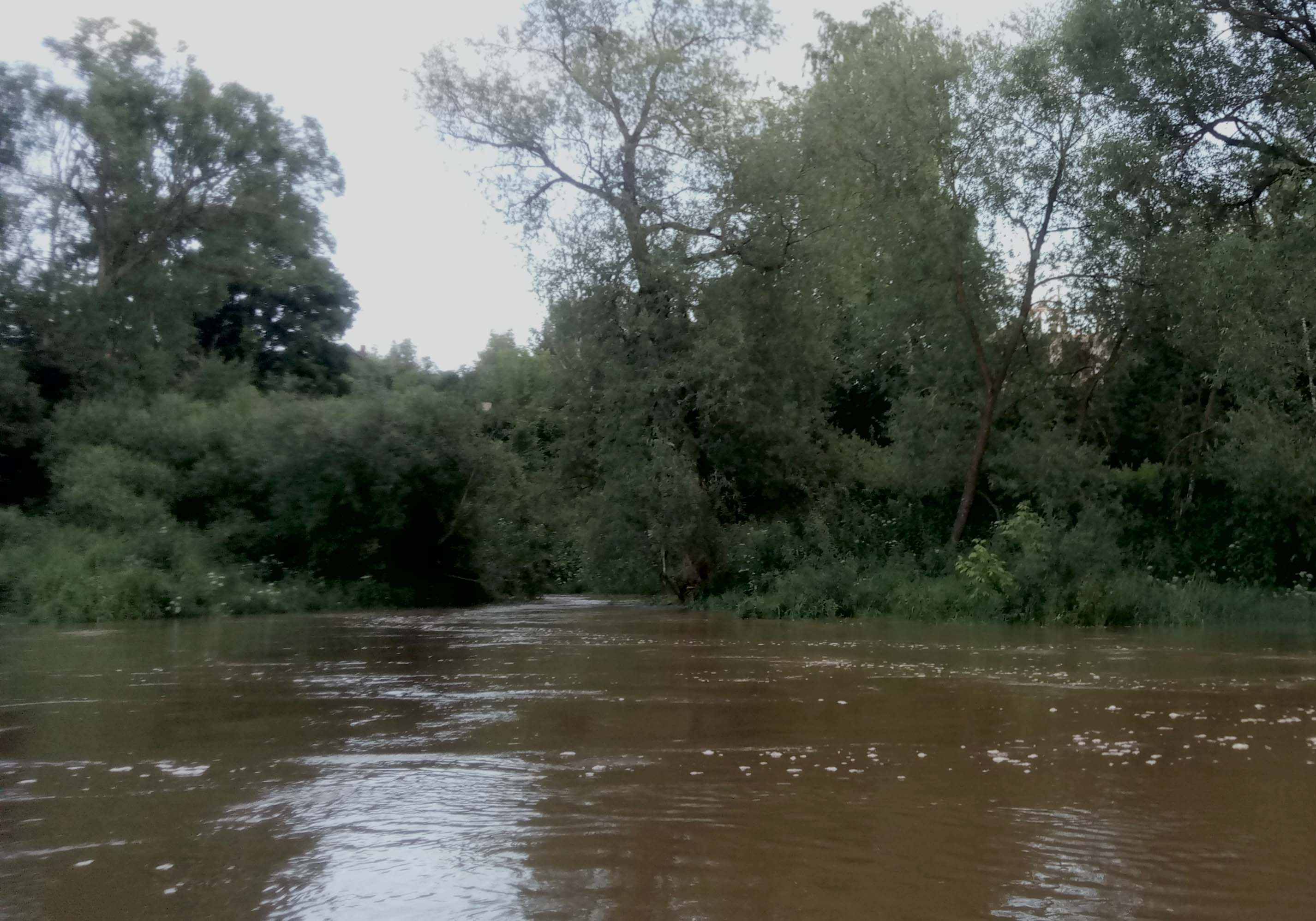 место впадения реки Нахабинка в реку Истра (Московская область)